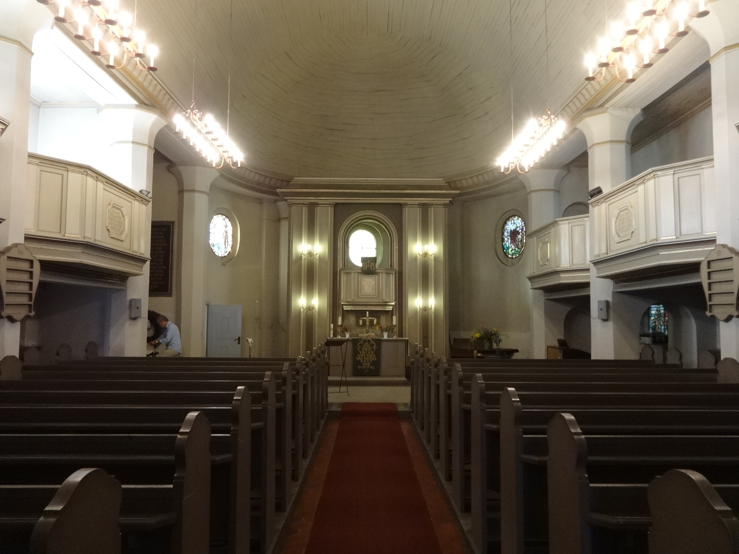 Dankeskirche in Halbe, Brandenburg